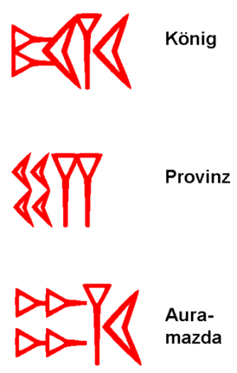 3 der 5 Wortzeichen der persischen Keilschrift